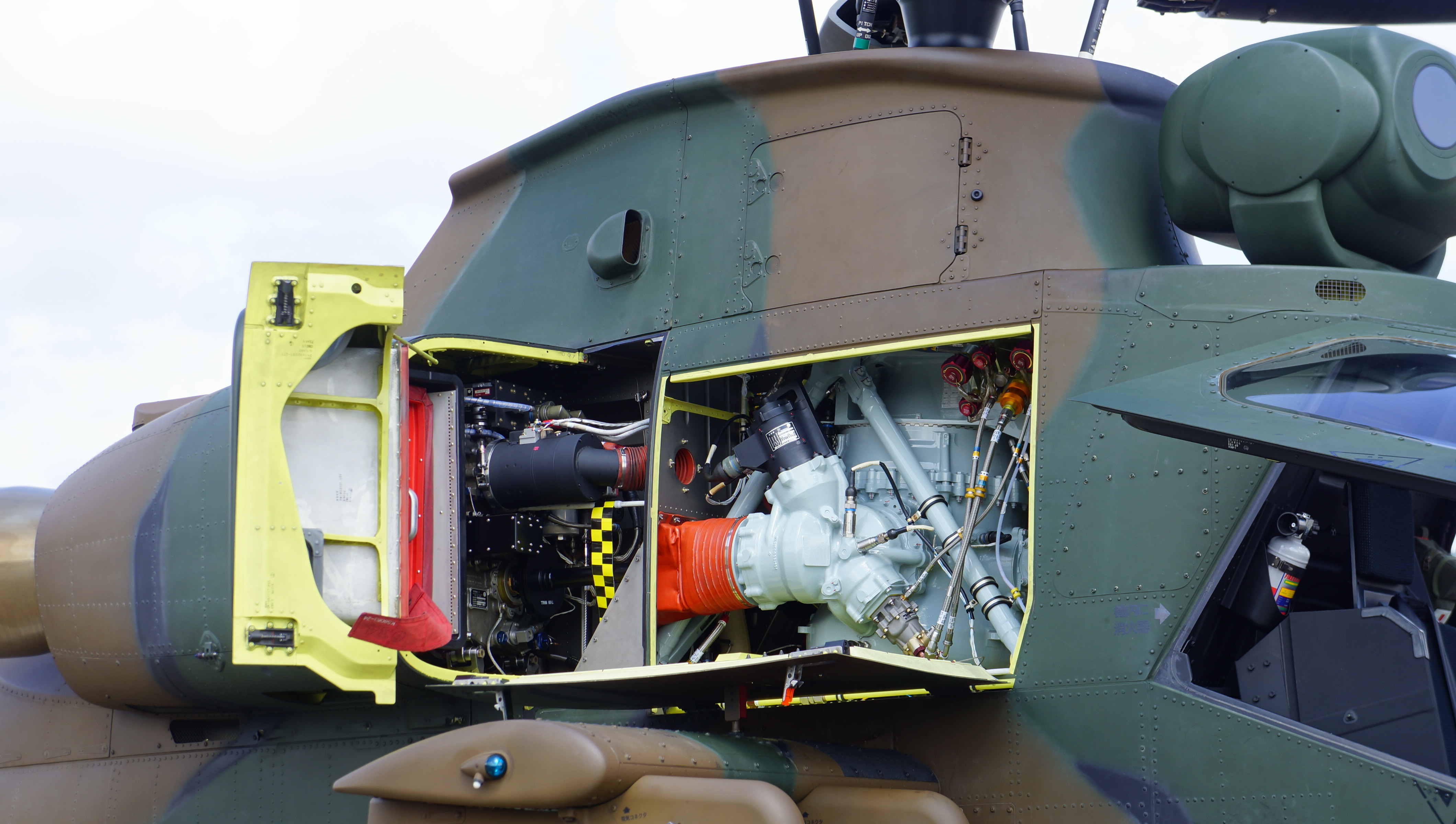 陸上自衛隊 OH-1観測ヘリコプター（32634号機） メイントランスミッション。 14年7月27日 海上自衛隊舞鶴航空基地にて。